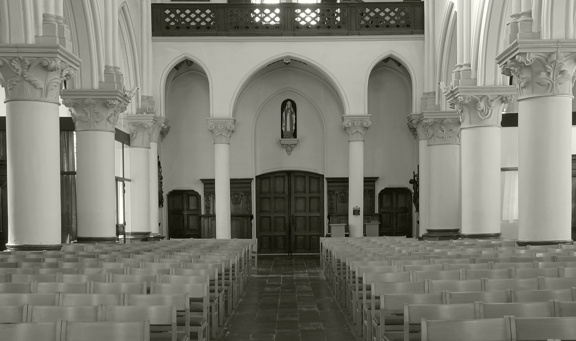 Sint-Willibrorduskerk (Merksplas) - Interieur - Middenbeuk -Achteraanzicht